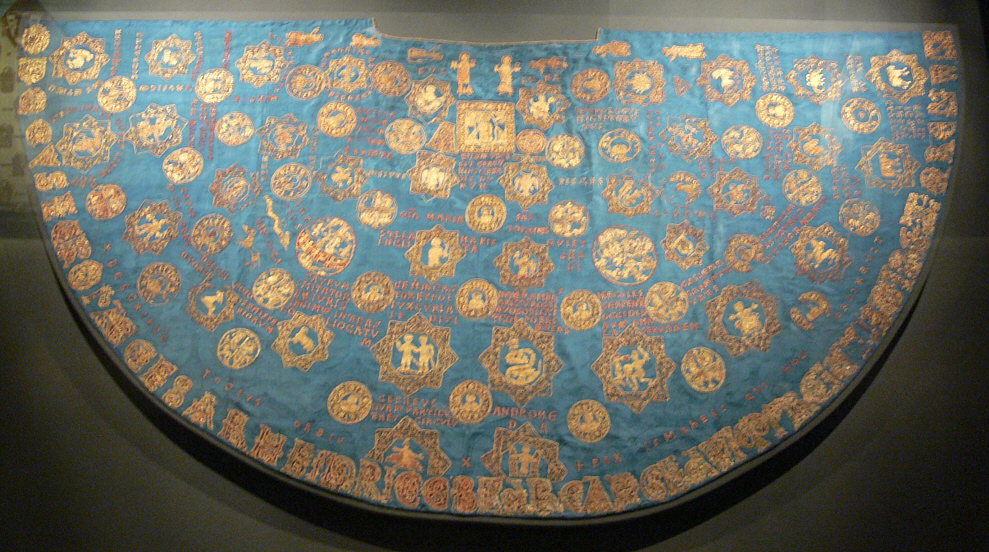 Sternenmantel Kaiser Heinrichs II. Stickereien: Regensburg, um 1018–1024, Trägerstoff: Italien, um 1453. Diözesanmuseum Bamberg (2728/3–6)